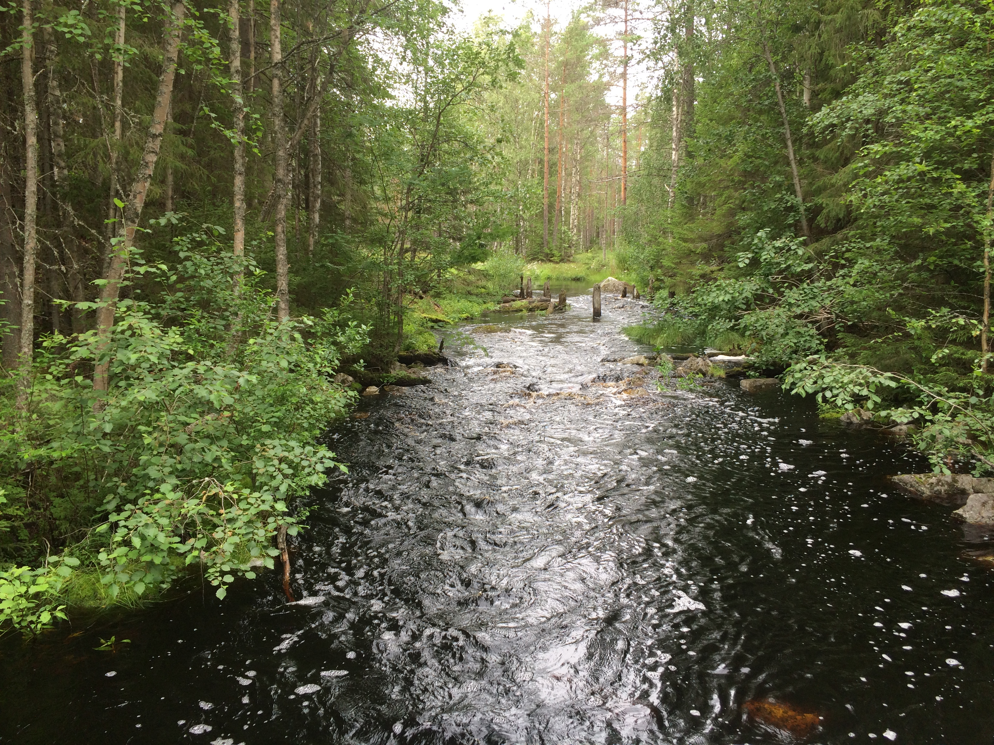 Пейтанйоки